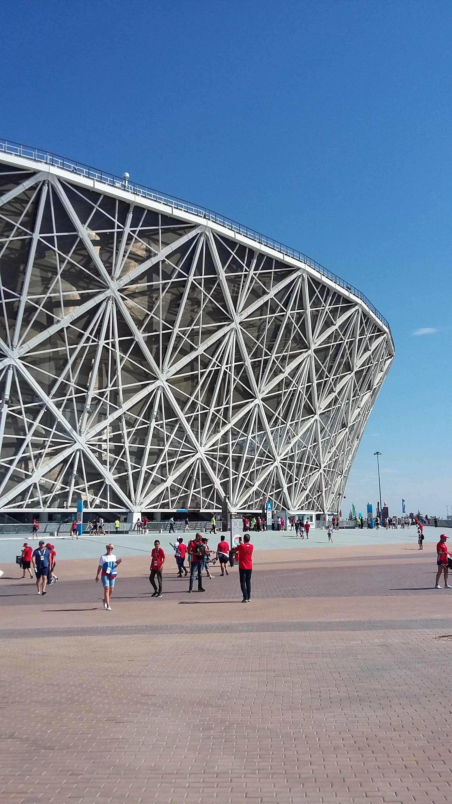 Volgograd Arena 2018-06-25 before match Saudi Arabia vs Egypt